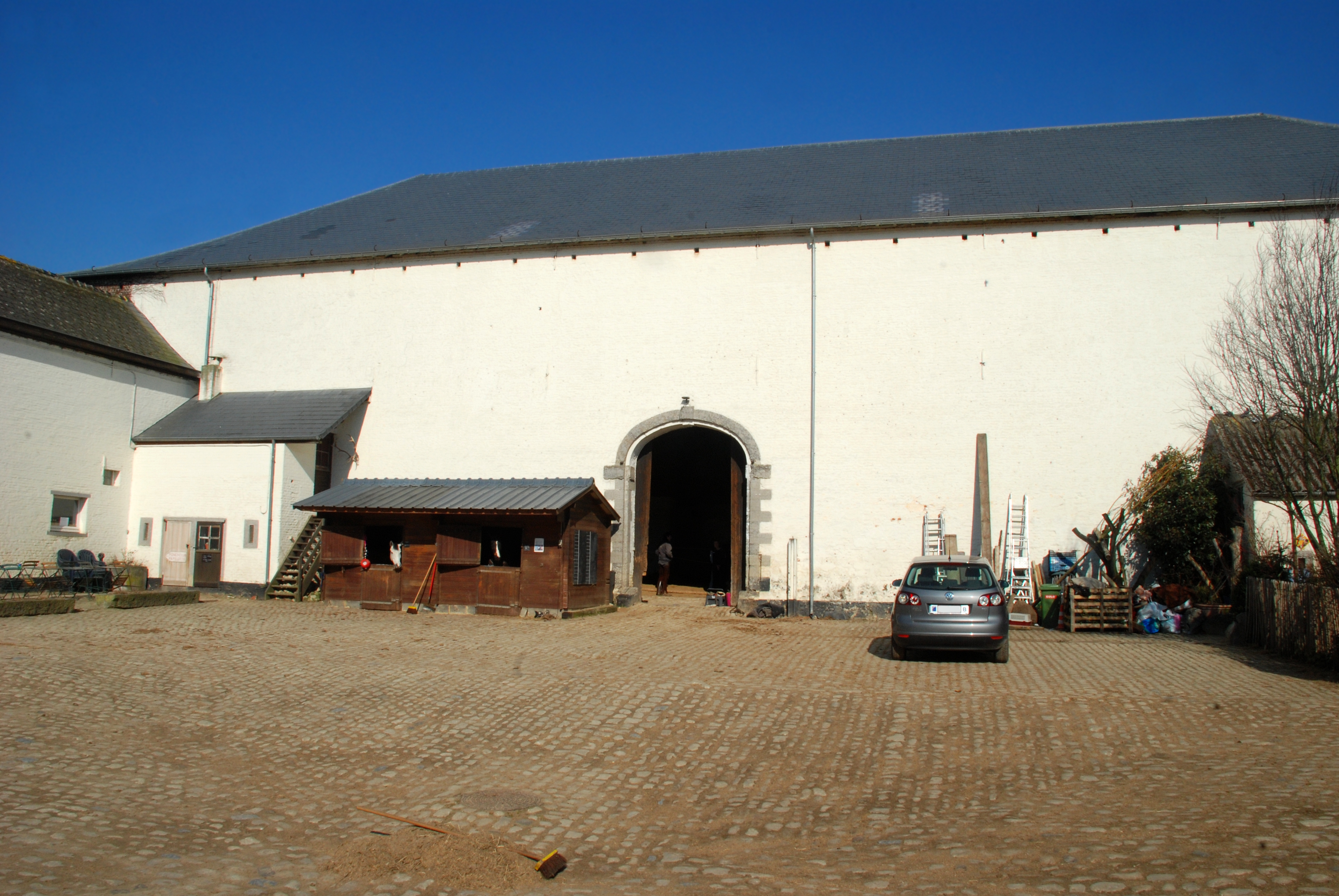 Belgique - Brabant wallon - Site de la bataille de Waterloo - Ferme de la Papelotte